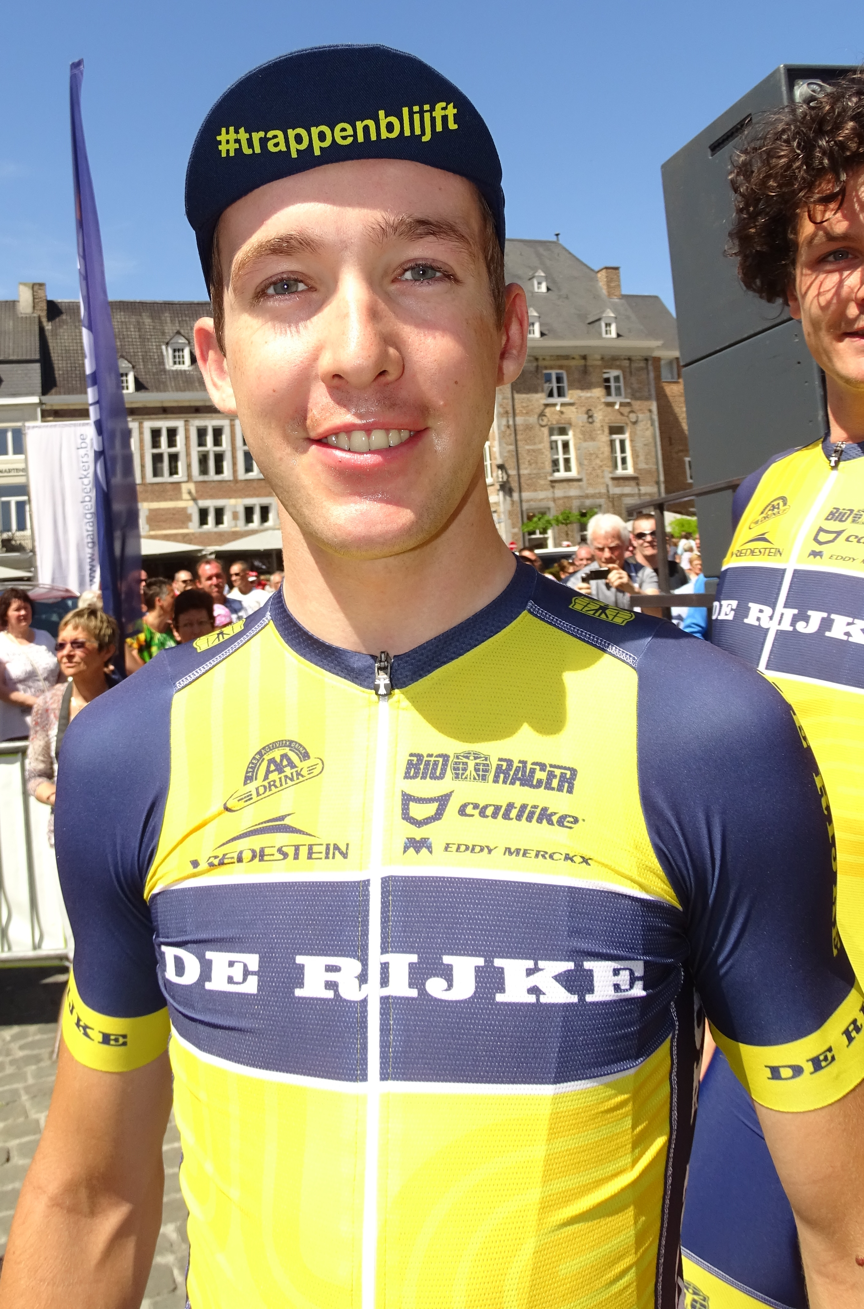 Reportage réalisé le dimanche 14 juin à l'occasion du départ et de l'arrivée du Tour du Limbourg 2015 à Tongres, Belgique.